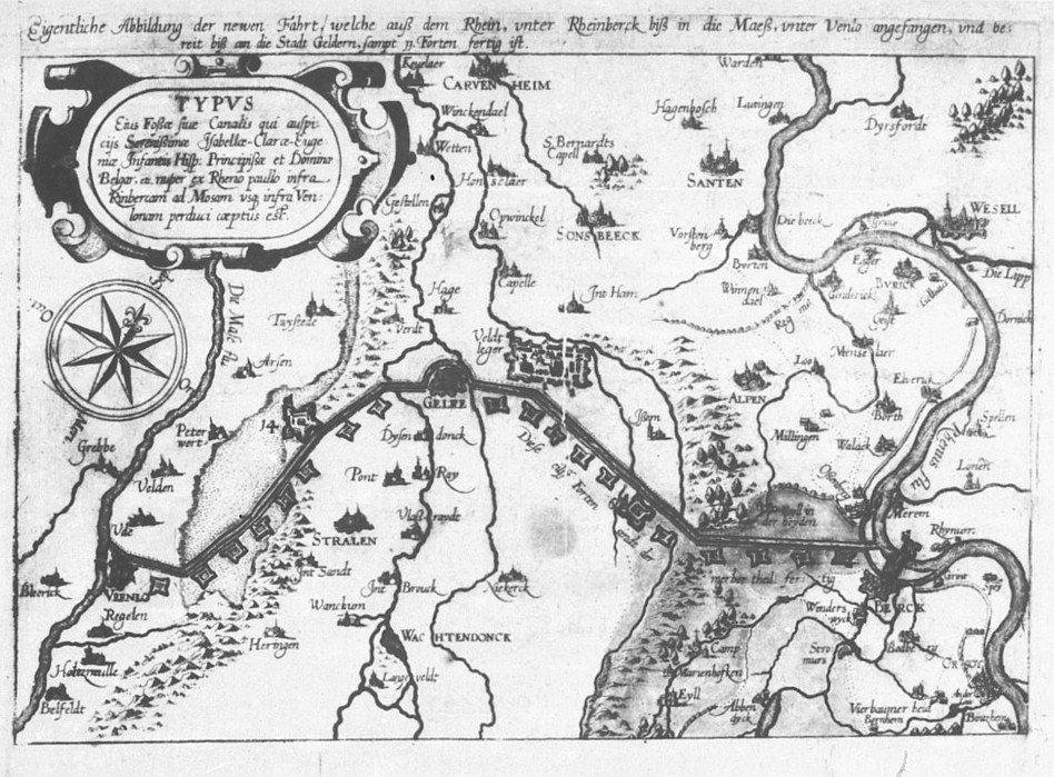 Karte der Fossa Eugeniana.